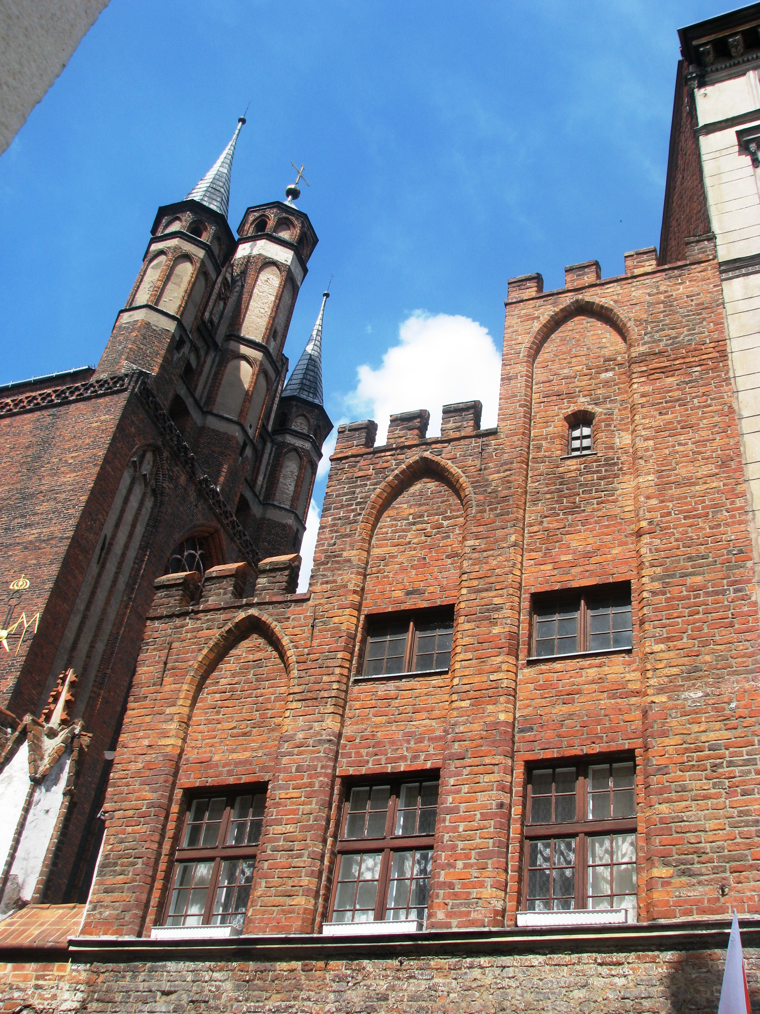 Toruń, ul. Panny Marii 2 - dom furtiana klasztoru franciszkanów, 2 poł. XIV w. / plabania kościoła Wniebowzięcia NMP (zabytek nr A/521)